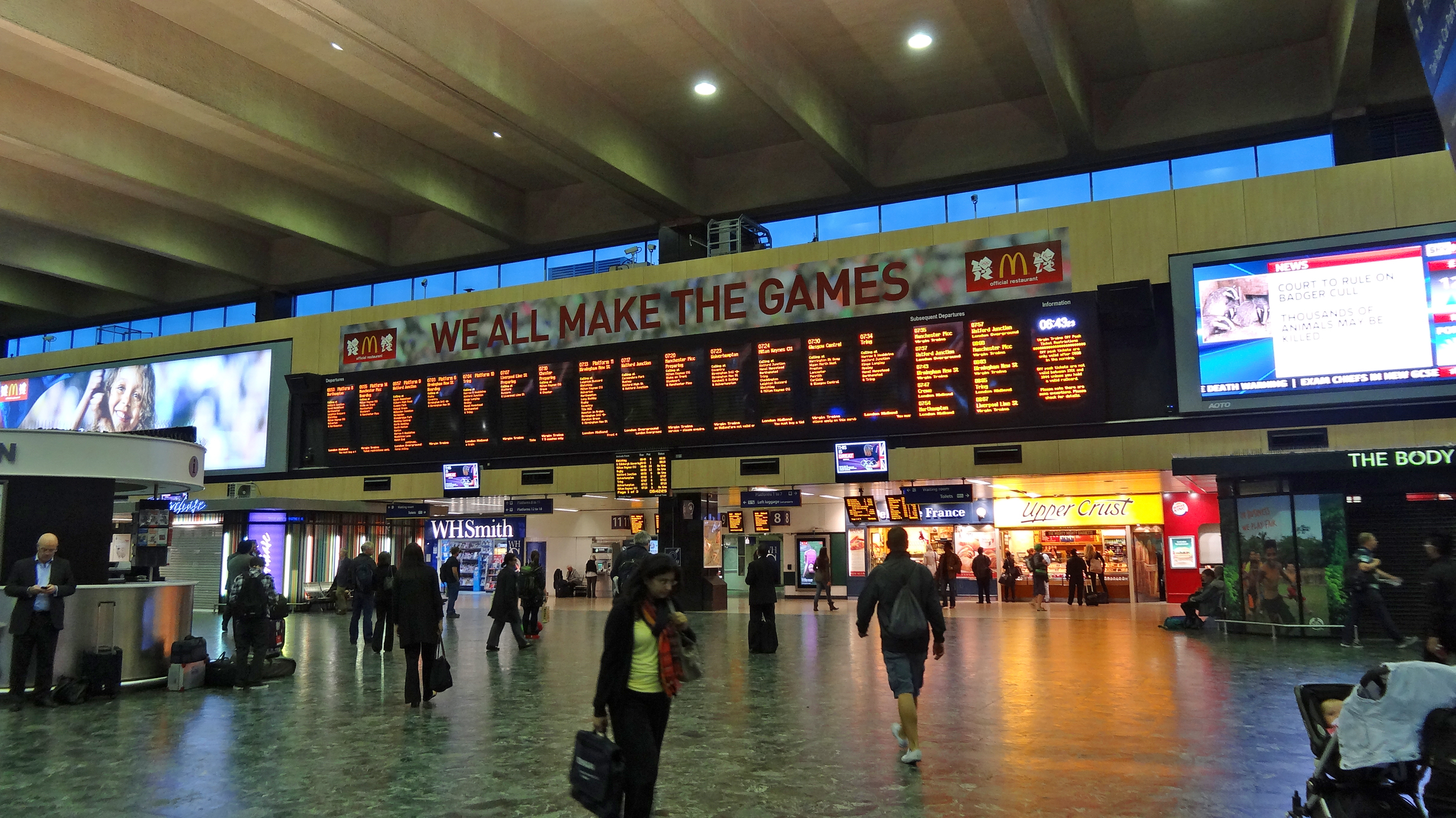 ユーストン駅コンコース（2012年）